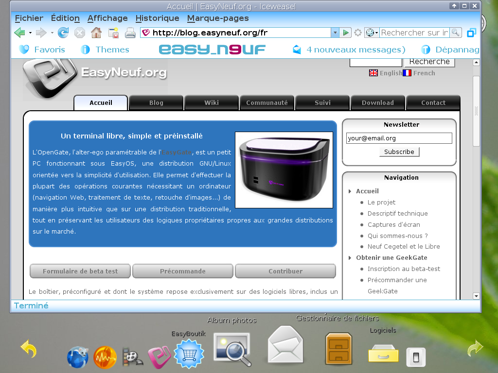 Screenshot de l'interface Expert de l'EasyOS